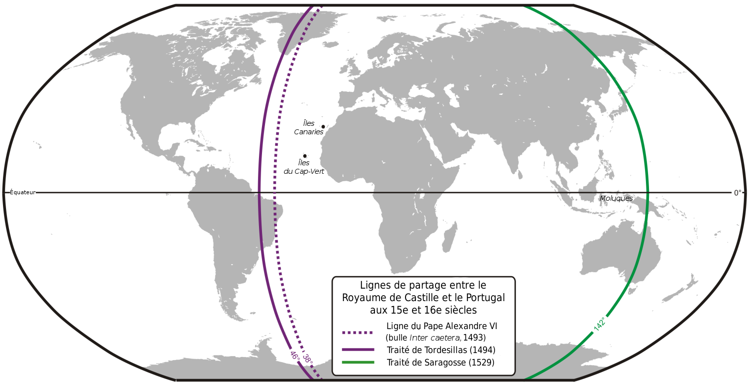 Lignes de partage entre le Royaume de Castille et le Portugal aux 15e et 16e siècles. (Traité de Tordesillas et Traité de Saragosse)